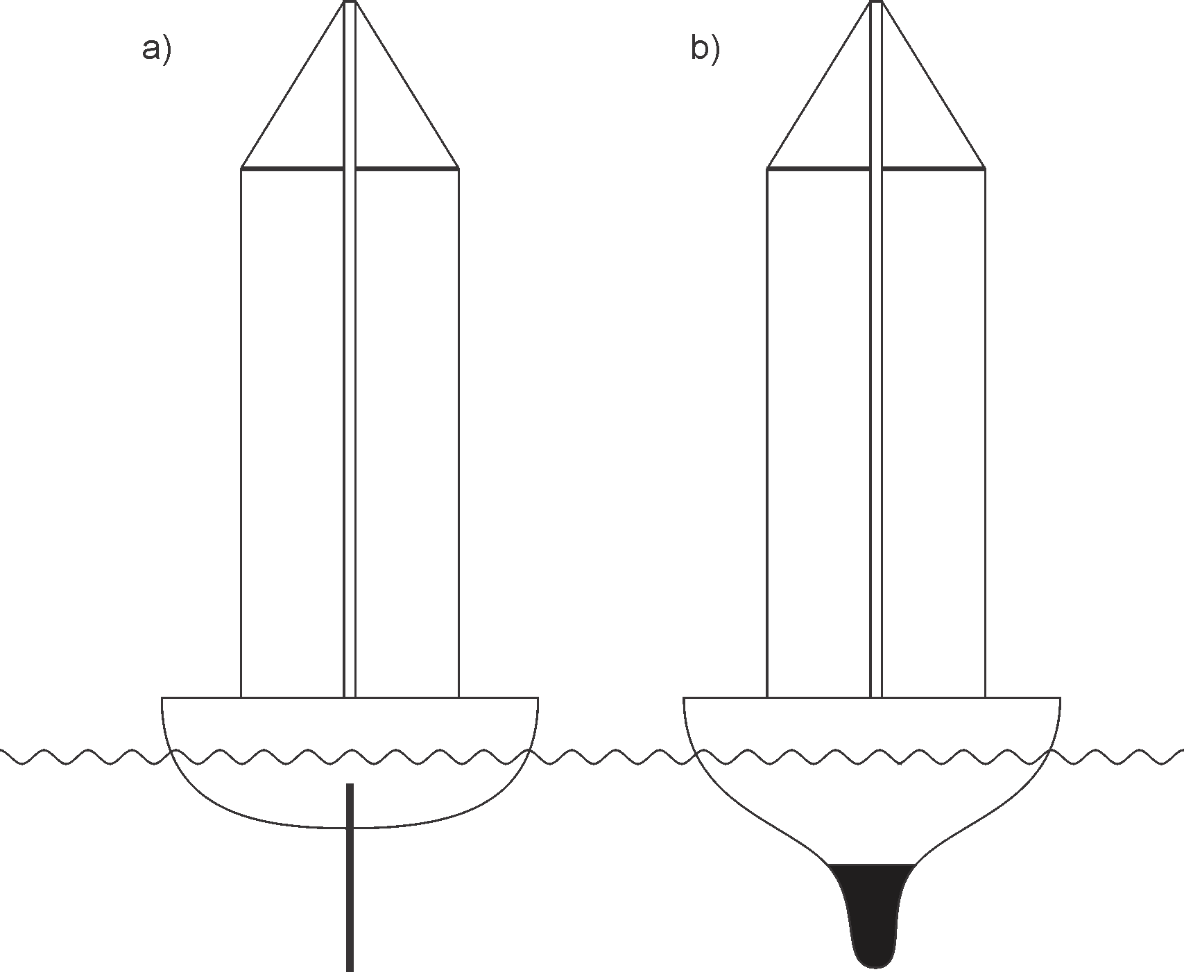 Schematyczne przedstawienie budowy jachtu mieczowego i balastowego